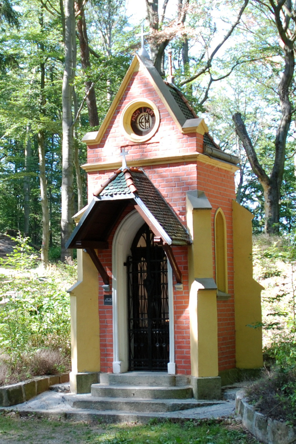 Kaple Ecce homo v karlovarských lázeňských lesích